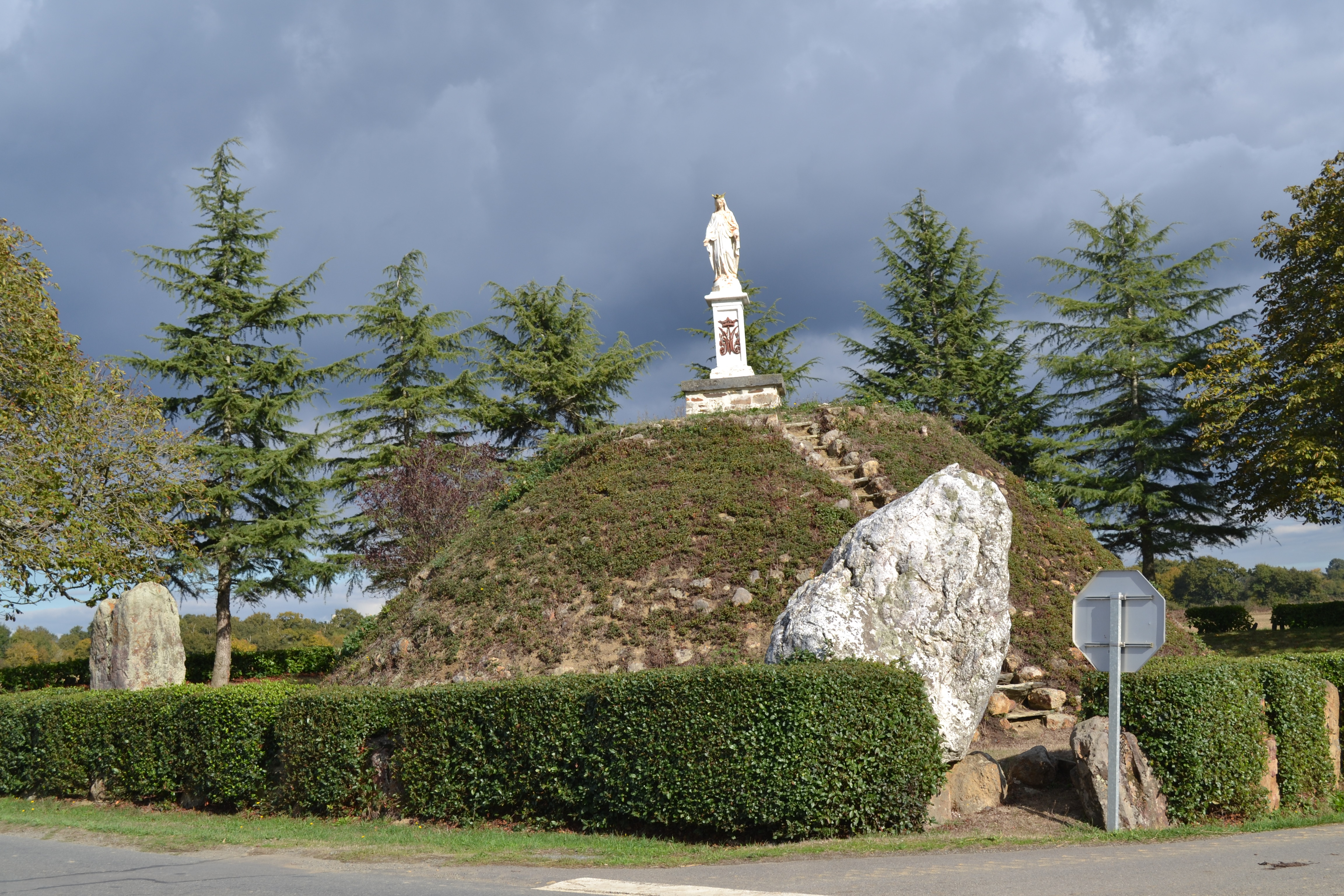 Calvaire mégalithique de Sion-les-Mines.